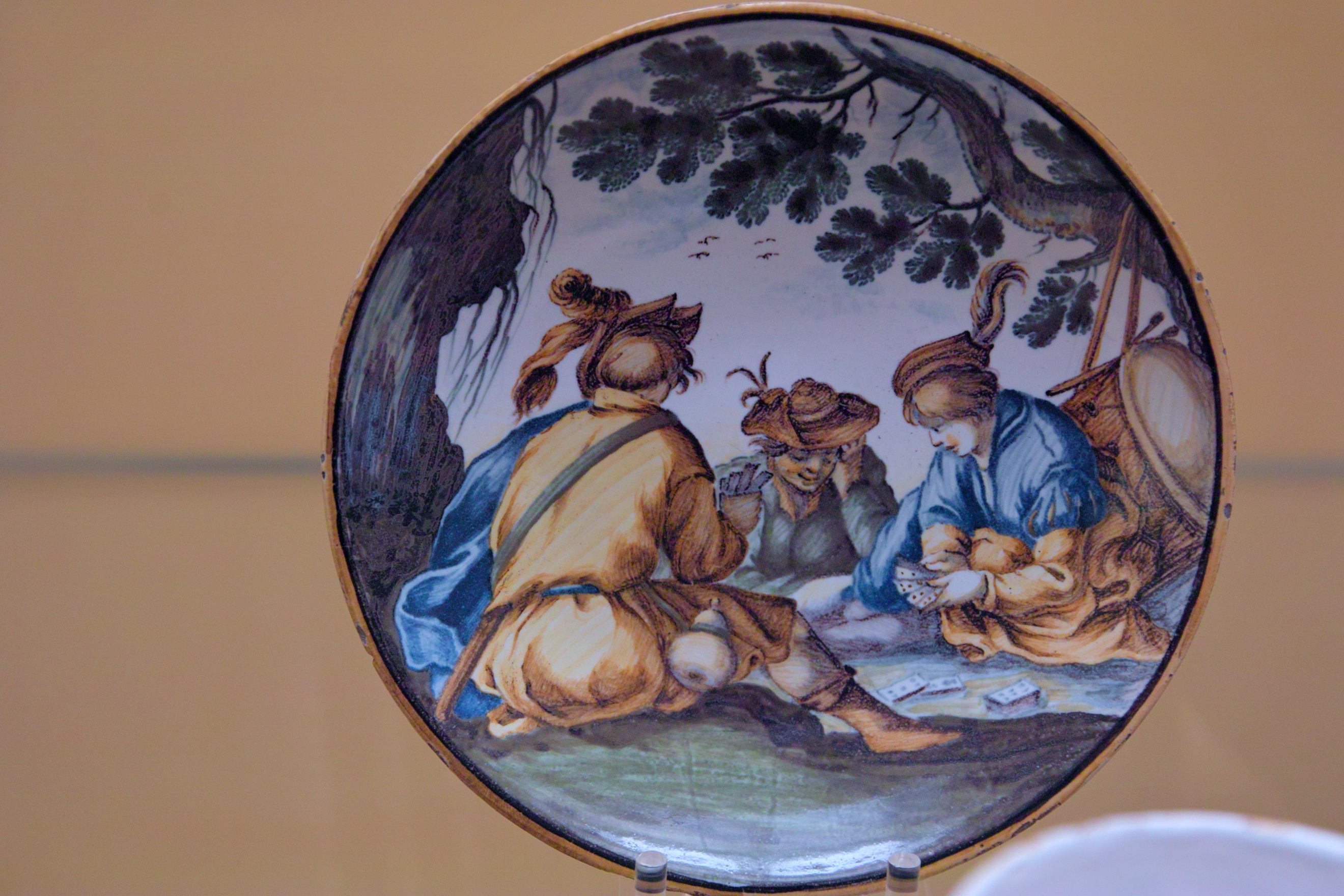 Museum für Kunst und Gewerbe, Hamburg: "Unterschale mit Kartenspielern, Castelli, um 1730. Malerei von Carmine Gentili (?)".